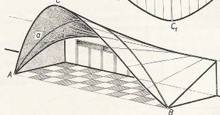 Pouziti konoidu jako stavebni plochy